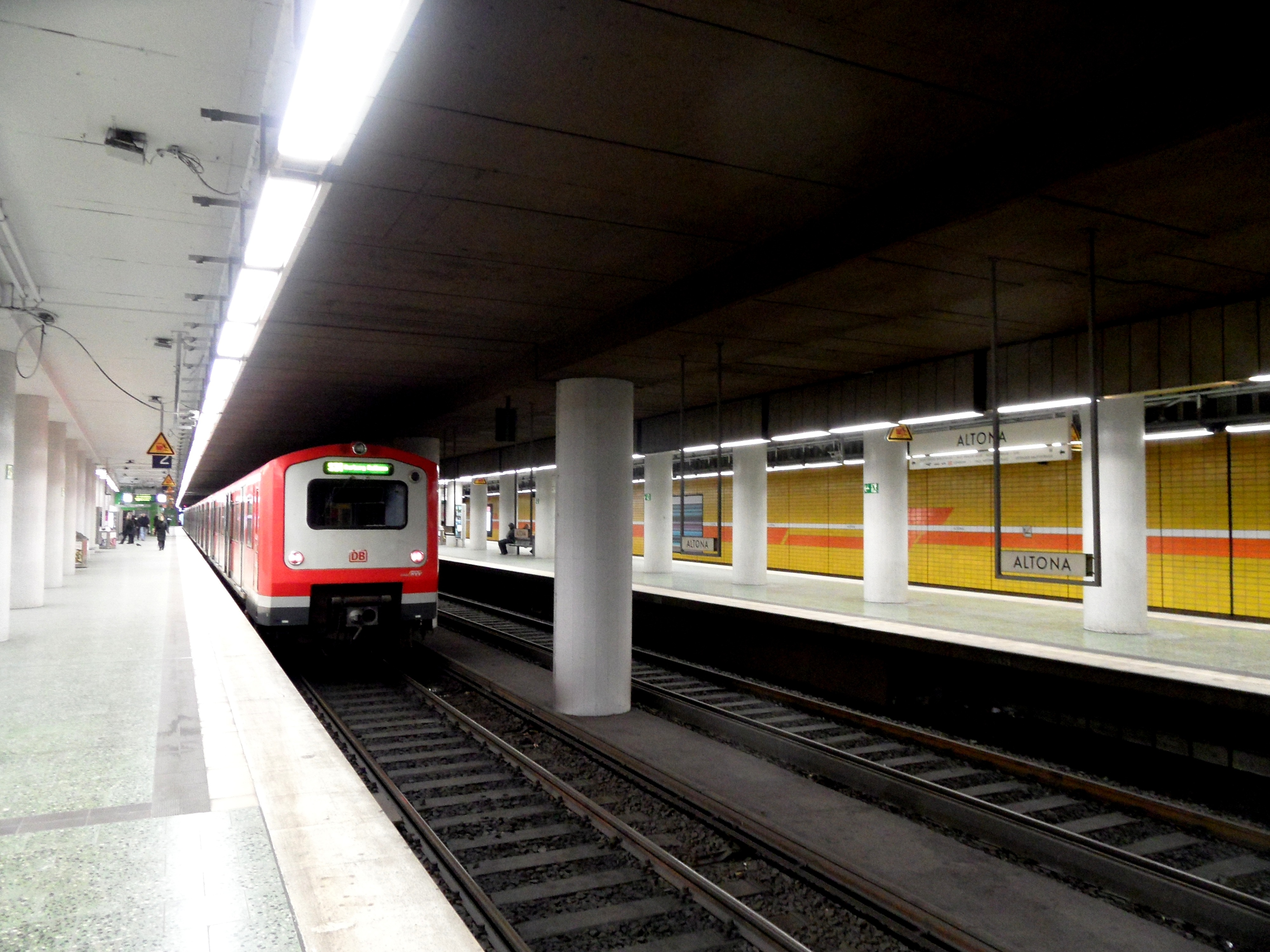 Hamburg - Bahnhof Altona - S-Bahnsteige im Tunnel